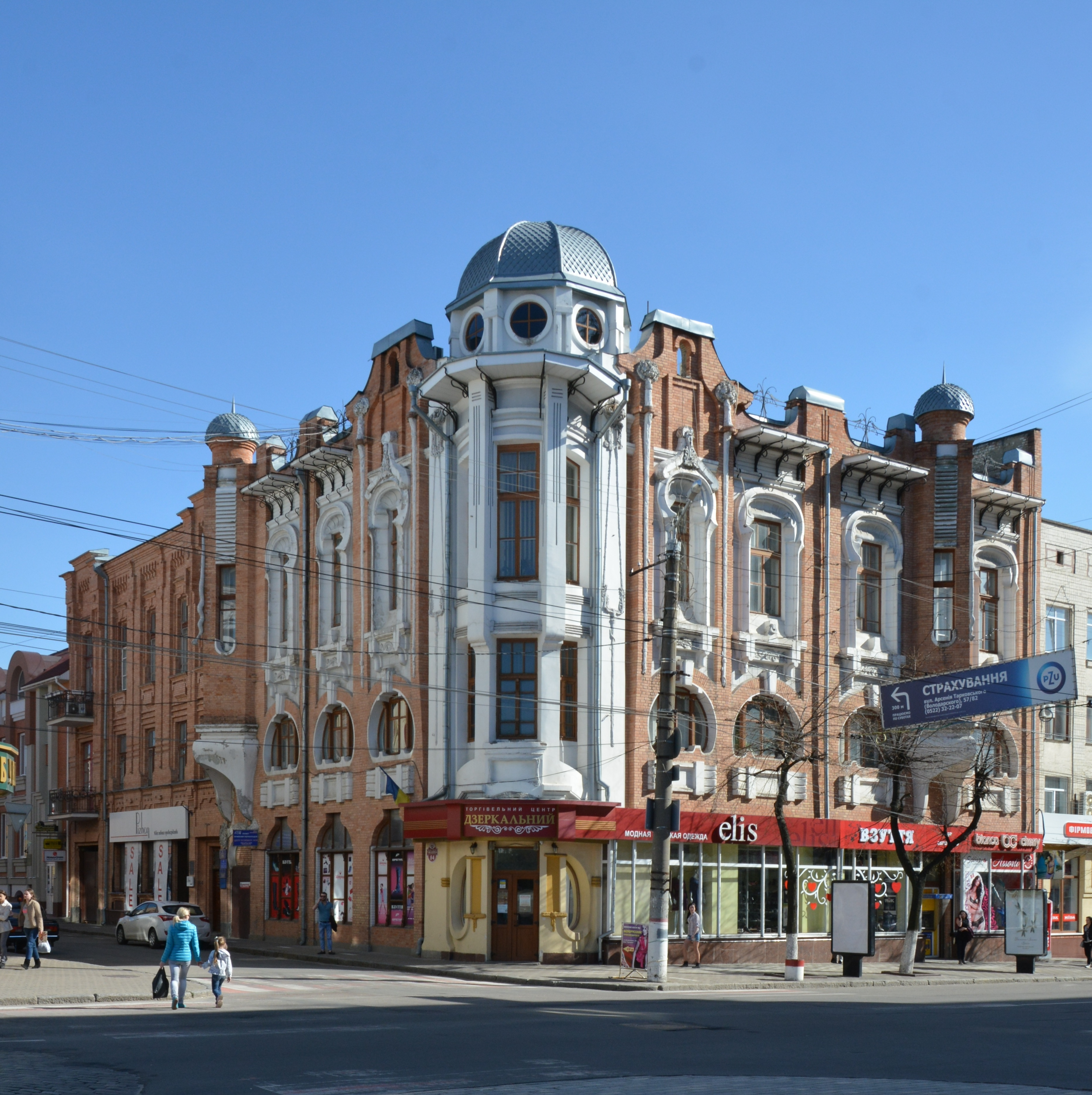 Прибутковий будинок, Кіровоград, вул. В. Чміленка, 84/37 (Велика Перспективна)